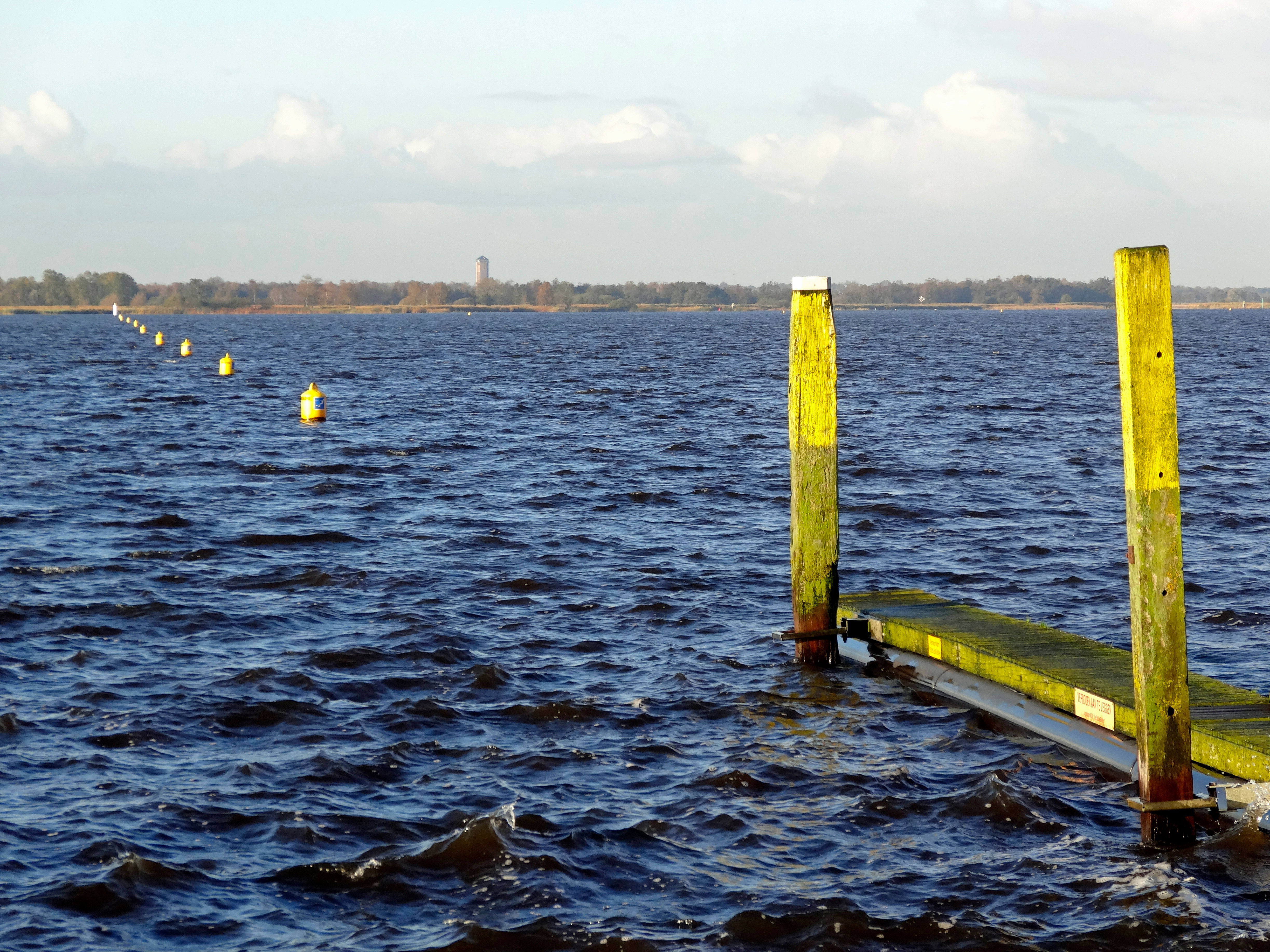 Westelijke Belterwijde, links van het midden aan de overzijde de watertoren van Sint Jansklooster